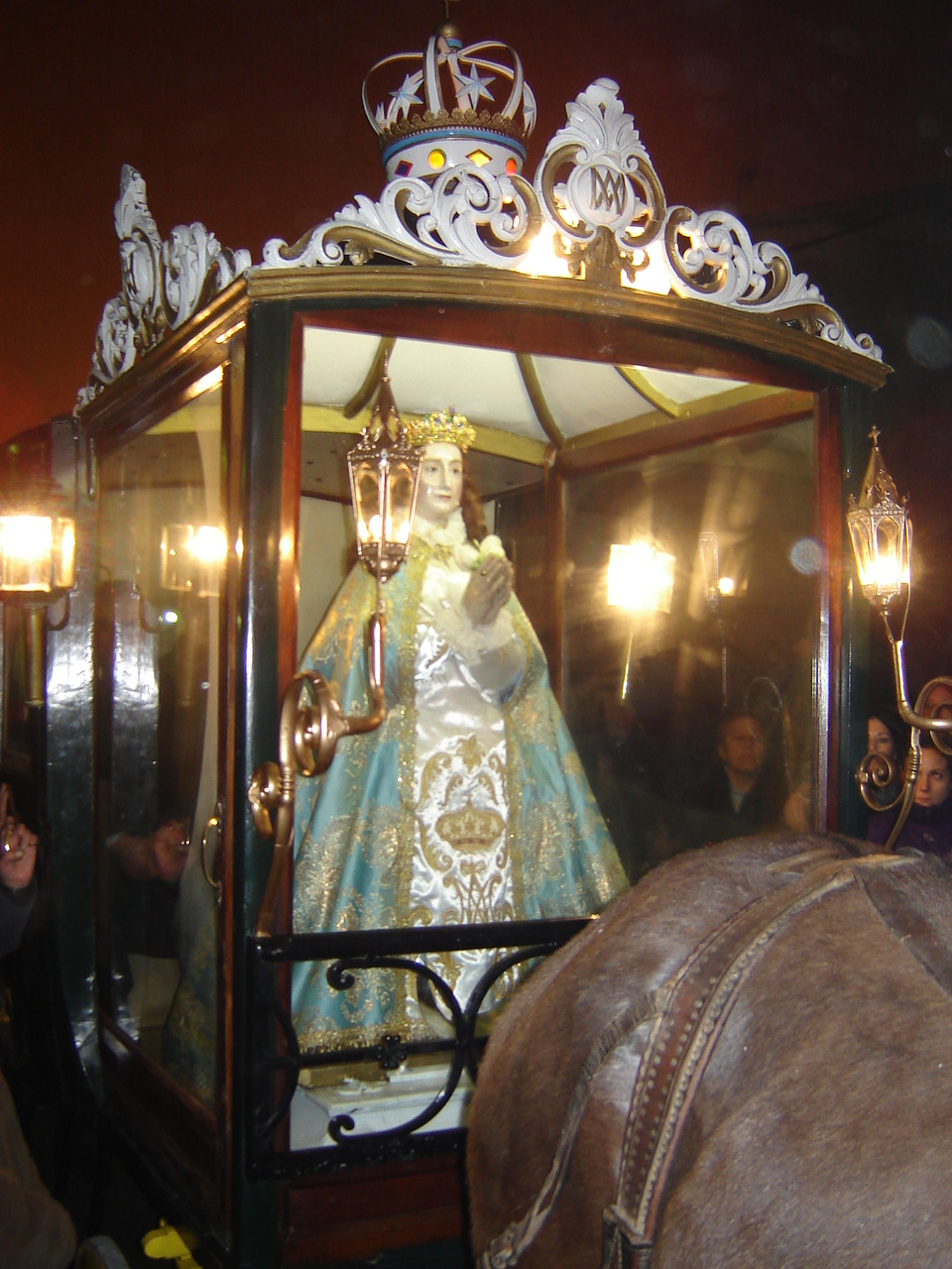 La Patrona de Nava en su carroza